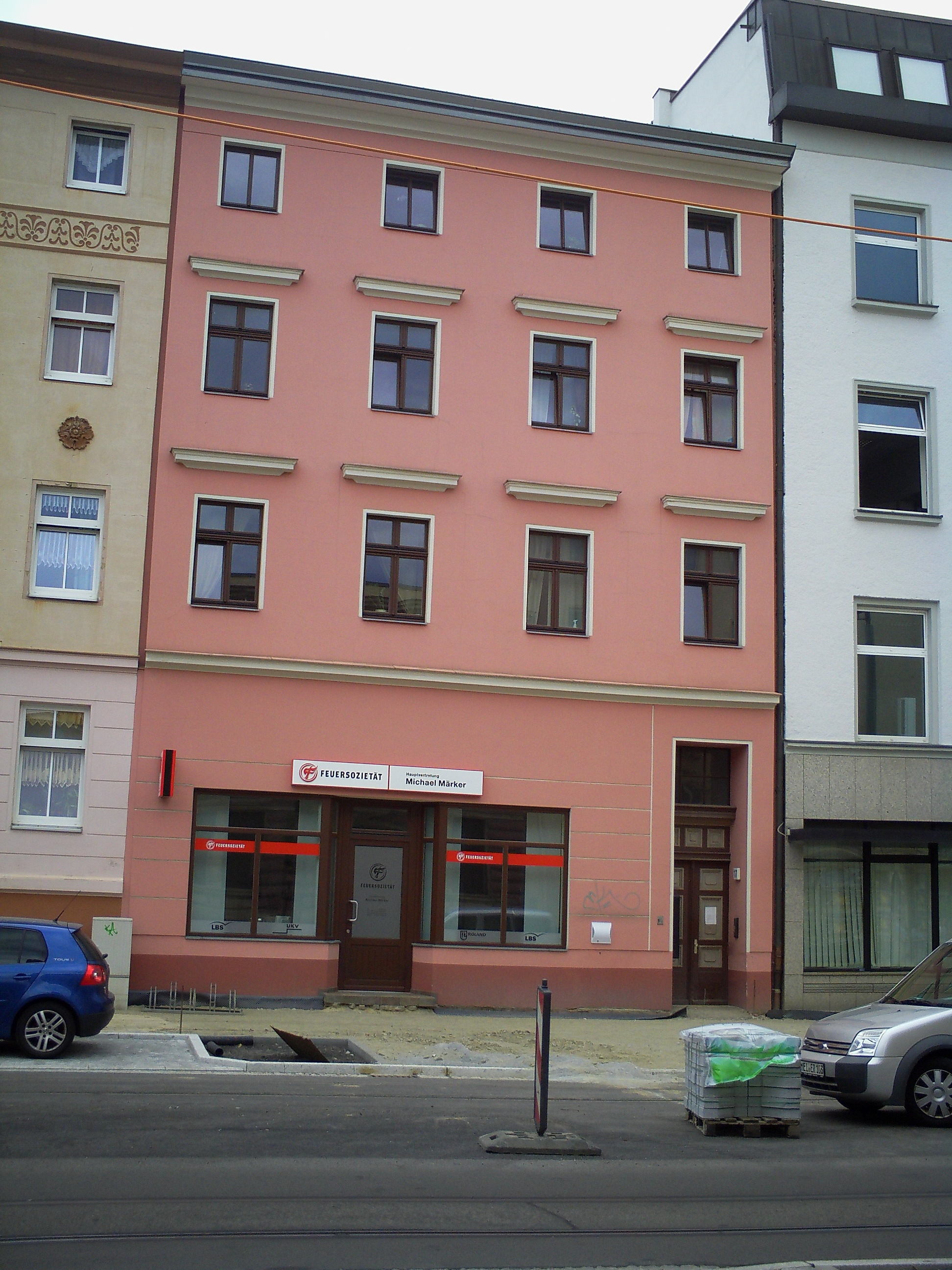 Bahnhofstraße 17 in Cottbus